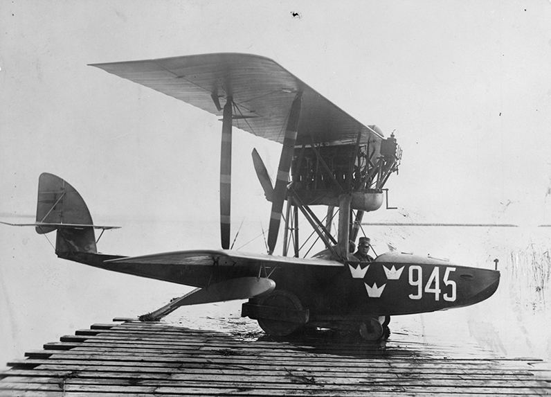 Sjöflygplanet Macchi M.7 i Svensk tjänst.